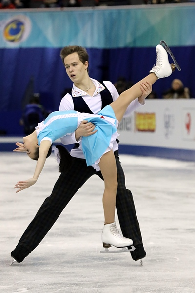 Аполлинария Панфилова / Дмитрий Рылов (Россия) на финале юниорского Гран-при 2017-2018